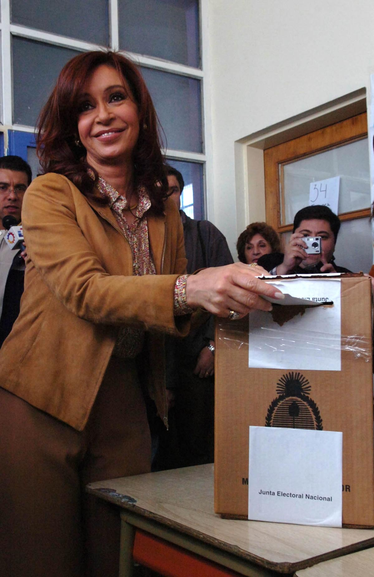 La senadora Cristina Fernández de Kirchner emitió su voto en la escuela Nuestra Señora de Fátima de esta ciudad.